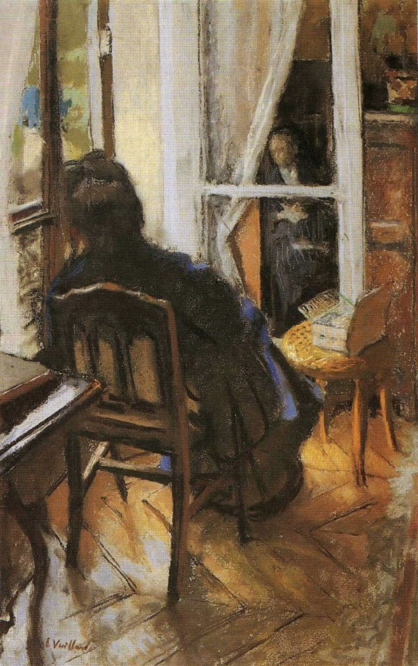 A la fenêtre, Edouard Vuillard, huile sur toile, musée André Malraux, Le Havre, France.